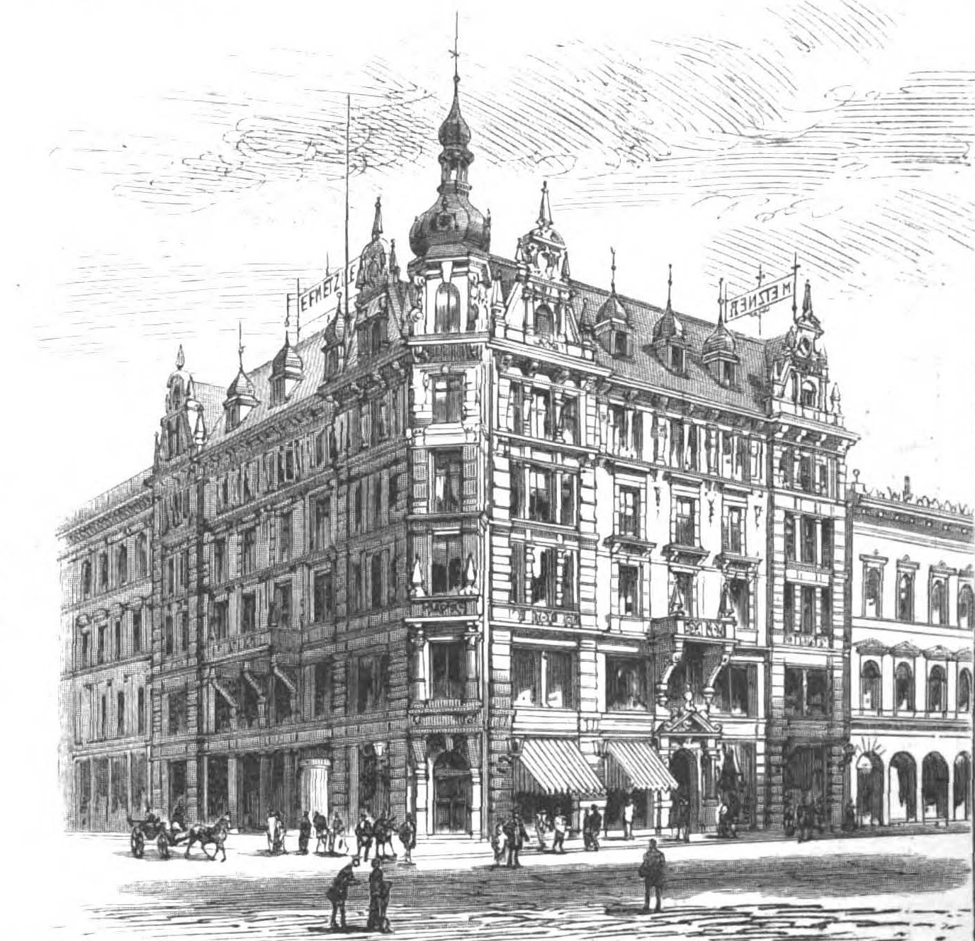 Das 1885 neu erbaute Haus der Firma Mezner in Berlin Ecke Mohren- und Markgrafenstraße. Illustrirte_Zeitung 1885-84, S. 213 + Text S. 209-210